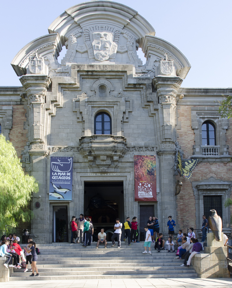 Puerta de entrada al Museo Casa de la Ciencia